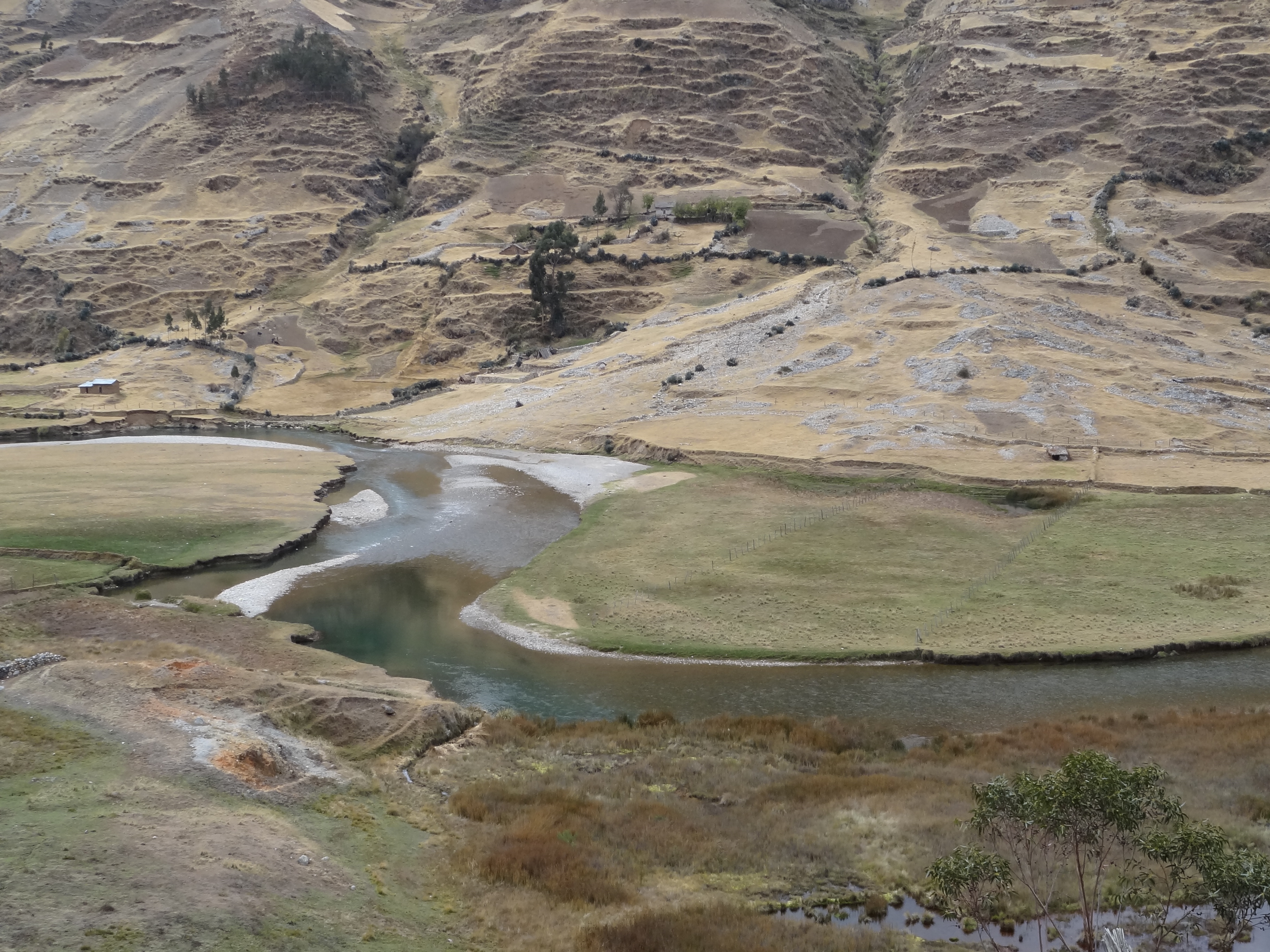 Meandro en el río Nupe, proximo a los baños El Batan.